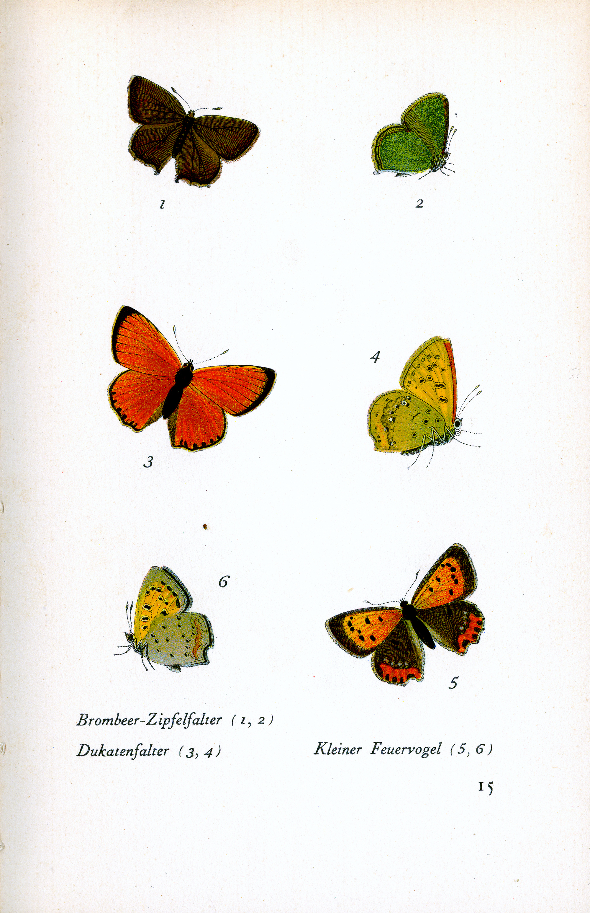 Brombeer-Zipfelfalter (Callophrys rubi), Dukatenfalter (Lycaena virgaureae), Kleiner Feuervogel/Feuerfalter (Lycaena phlaeas)